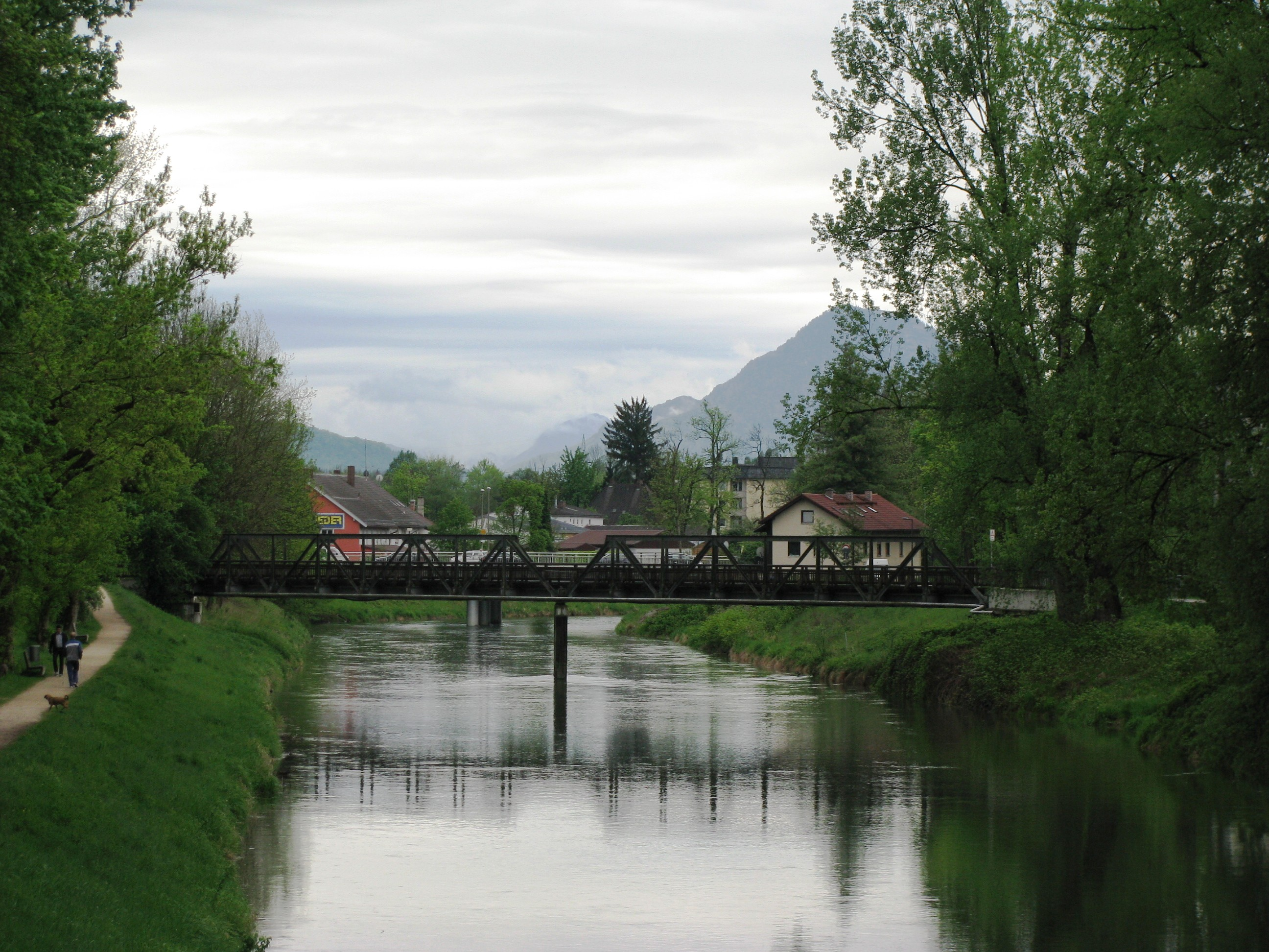 Mangfall in Rosenheim kurz vor ihrer Mündung in den Inn